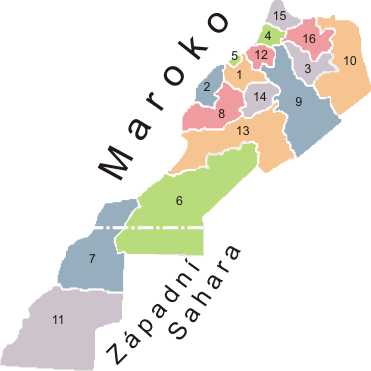 Regions of Morocco and Western Sahara / Administrativní dělení Maroka a Západní Sahary